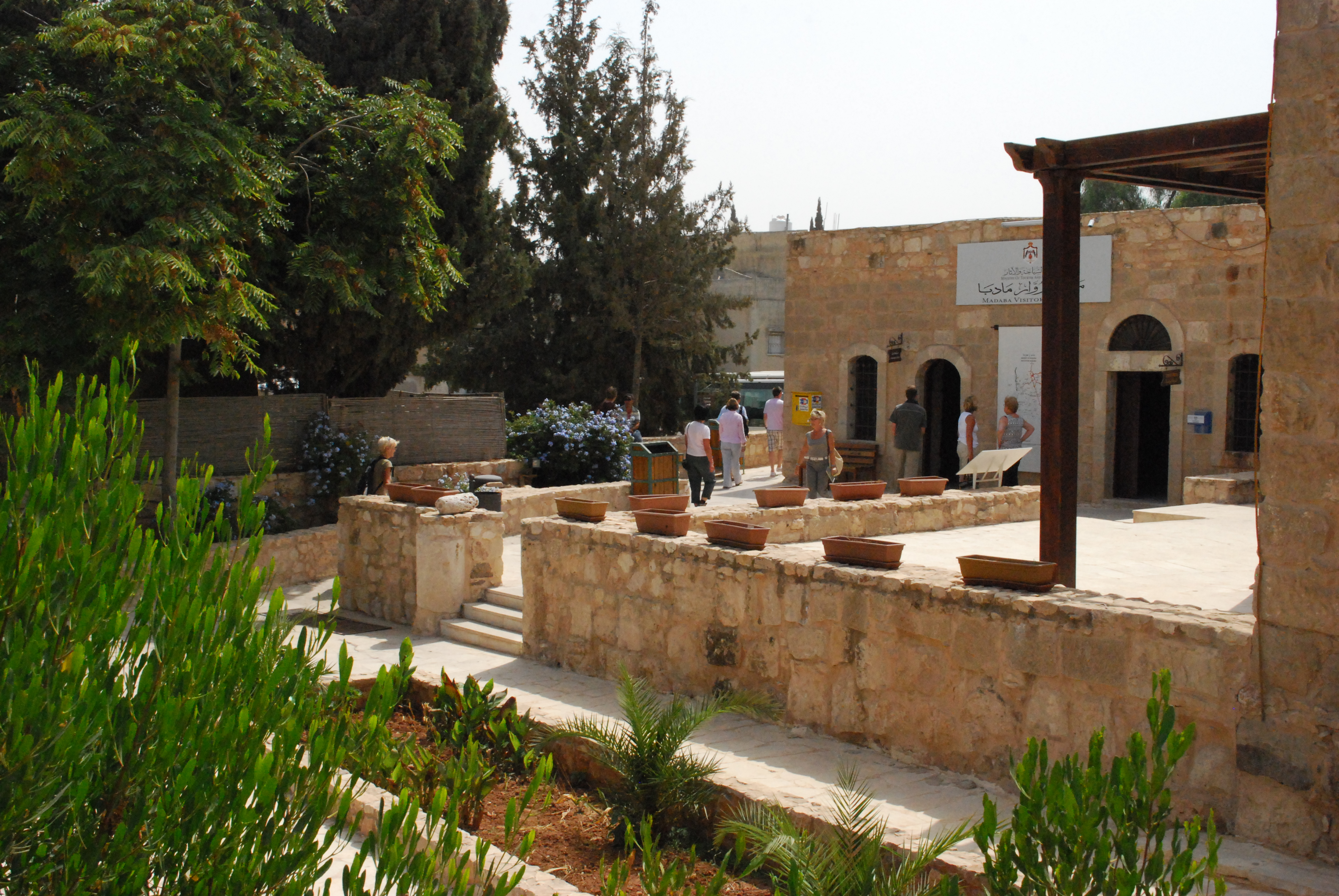 Madaba : centre d'accueil touristique.